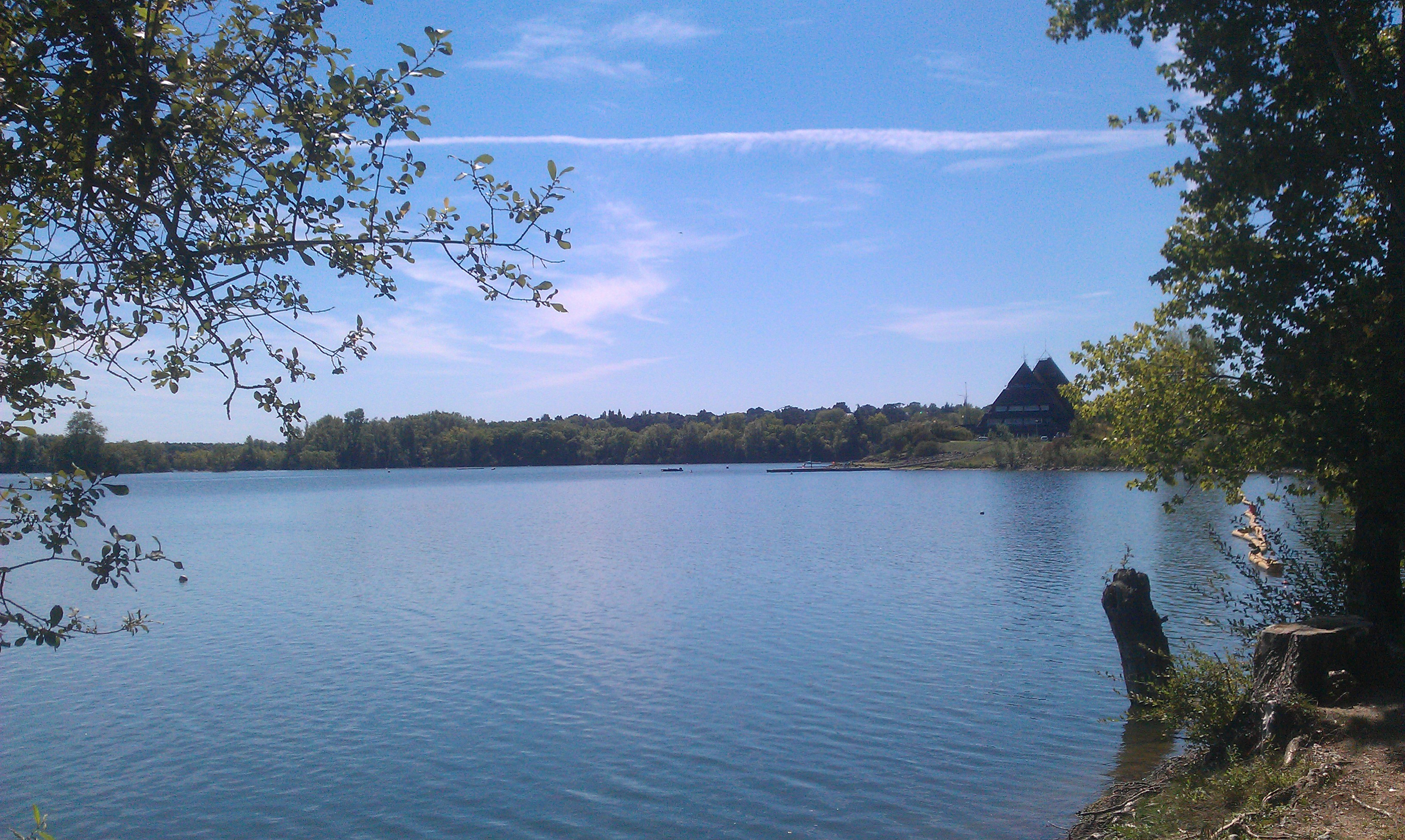 Base de loisir du Lac de Maine à Angers